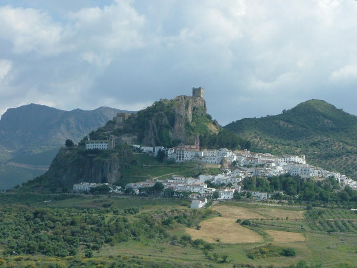 Zahara de la Sierra